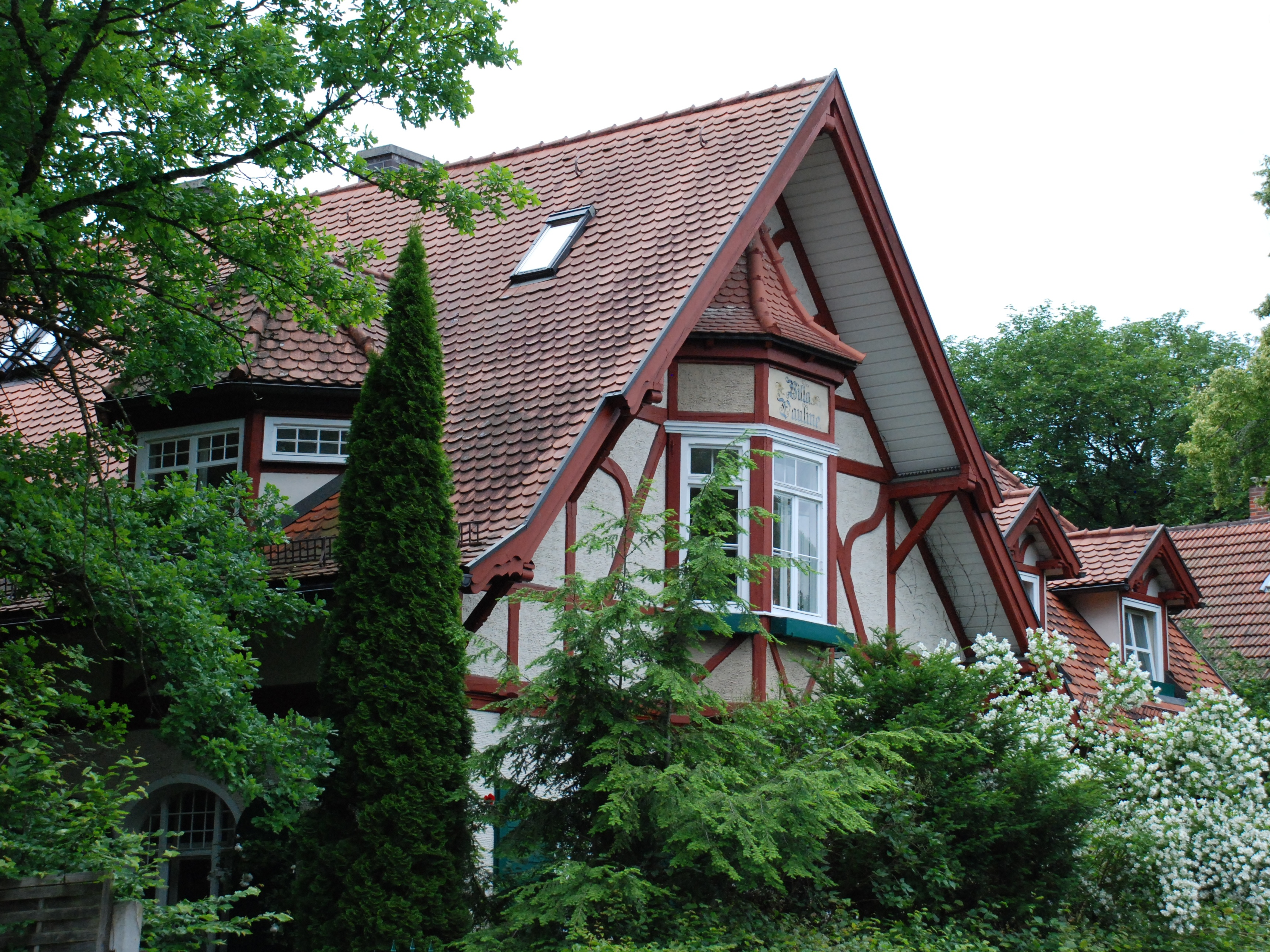 Villa Pauline in der Karlstraße 5 in Planegg, Landkreis München, Bezirk Oberbayern, Bayern. Als Baudenkmal unter Aktennummer D-1-84-138-15 in der Bayerischen Denkmalliste aufgeführt. Laut Denkmalliste 1899 erbaut. Foto gemäß den Voraussetzungen zur Panoramafreiheit von öffentlichem Verkehrsgrund aus aufgenommen.